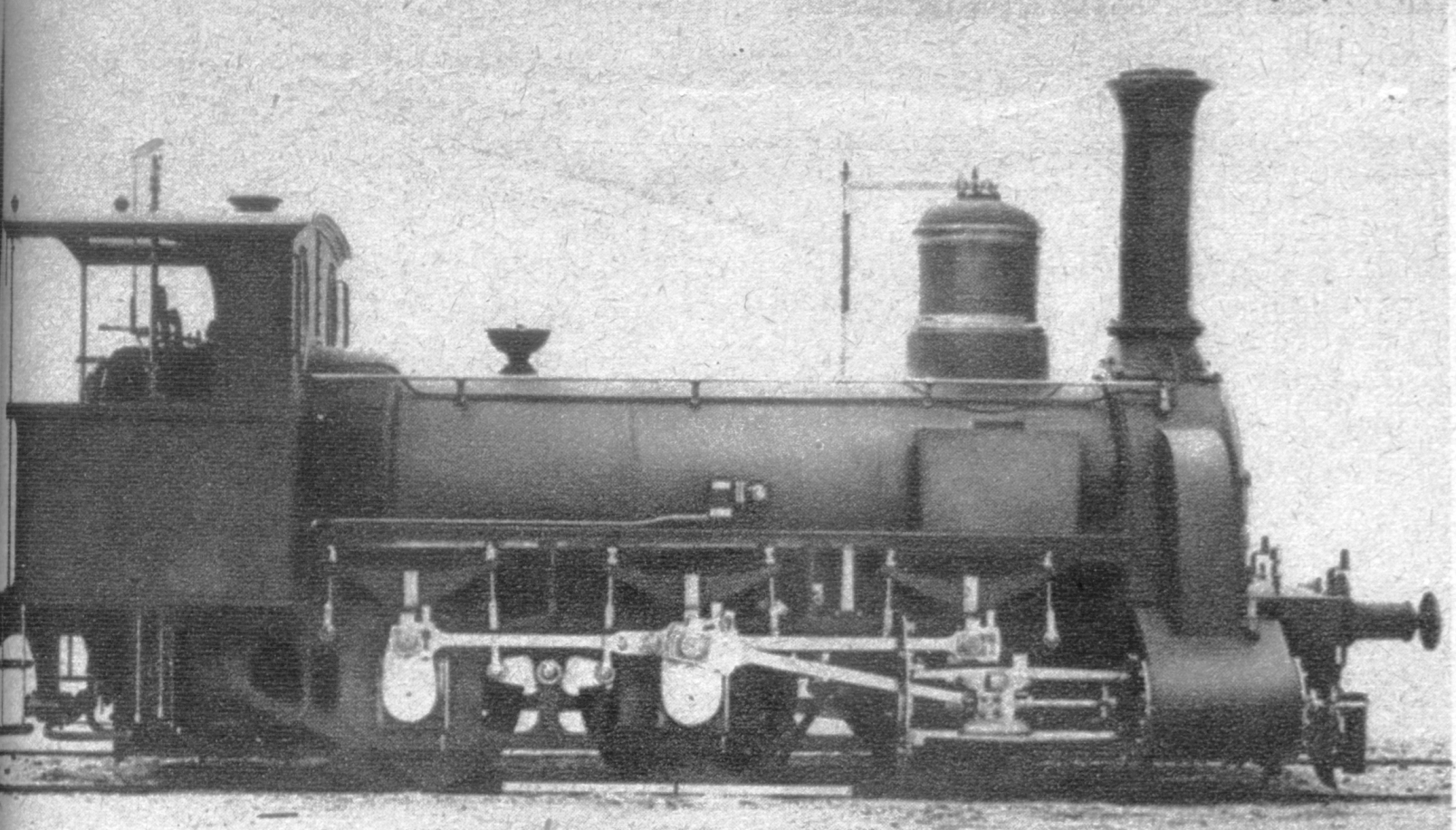 A Magyar Királyi Állami Gépgyárban 1873-ban készült első mozdony